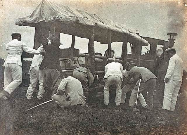 中文（台灣）: 西元1931年（昭和6年）就任的台灣總督太田政弘，於巡視高雄地區途中，所搭乘的輕便小火車發生脫軌，照片中的隨行人員正合力要將後方座車架回軌道，攝於西元1931年（昭和6年）。